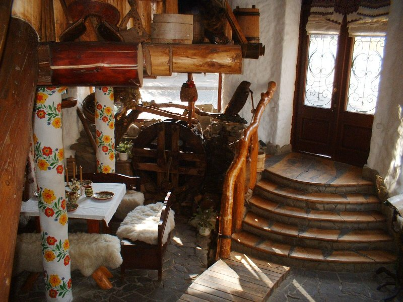 Tradicionalni restaurant u Ljvivu (Lavovu), Ukrajina